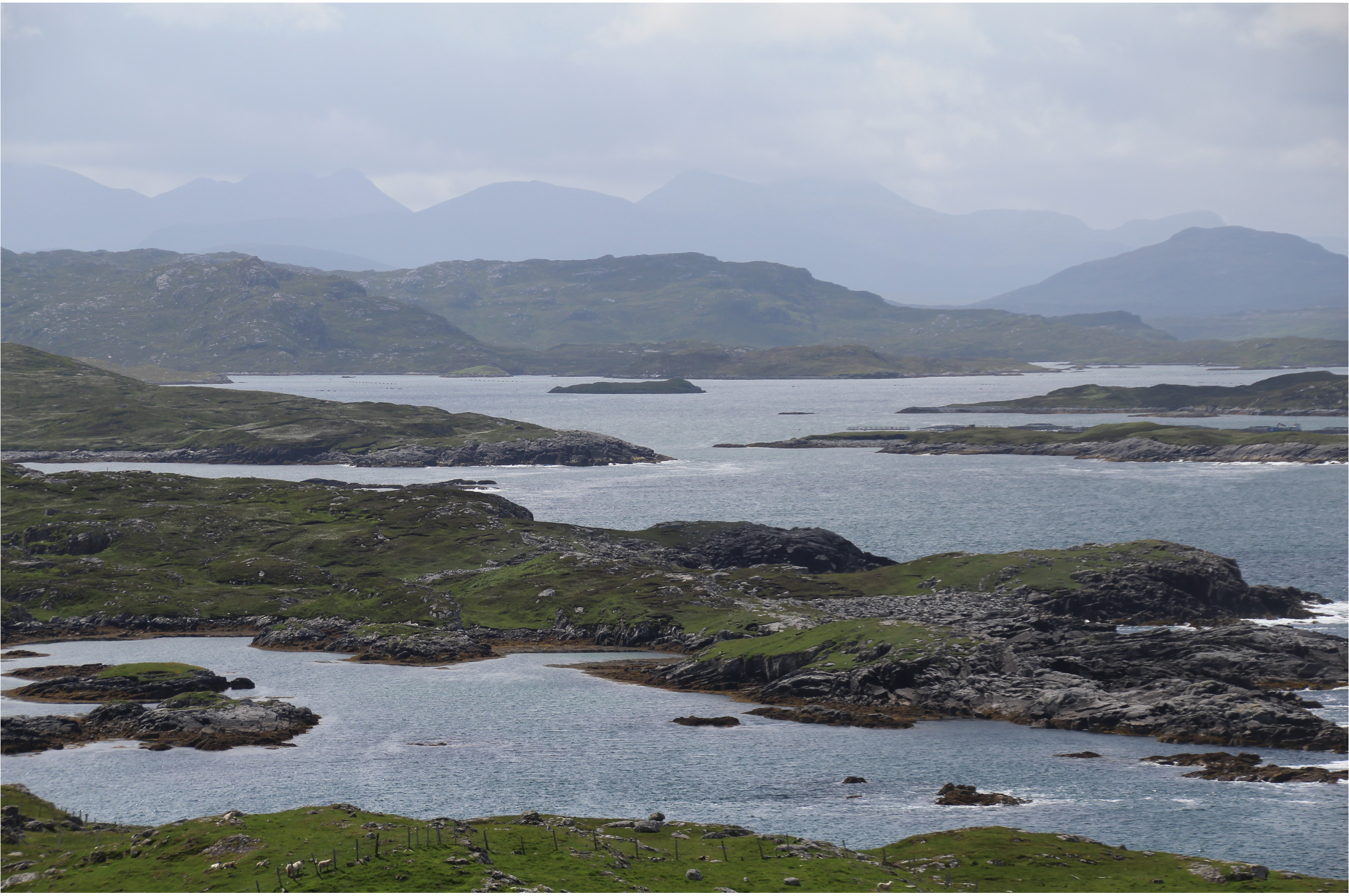 Westküste von Great Bernera, Äußere Hebriden, Schottland. Die Berge im Hintergrund gehören zu Harris.